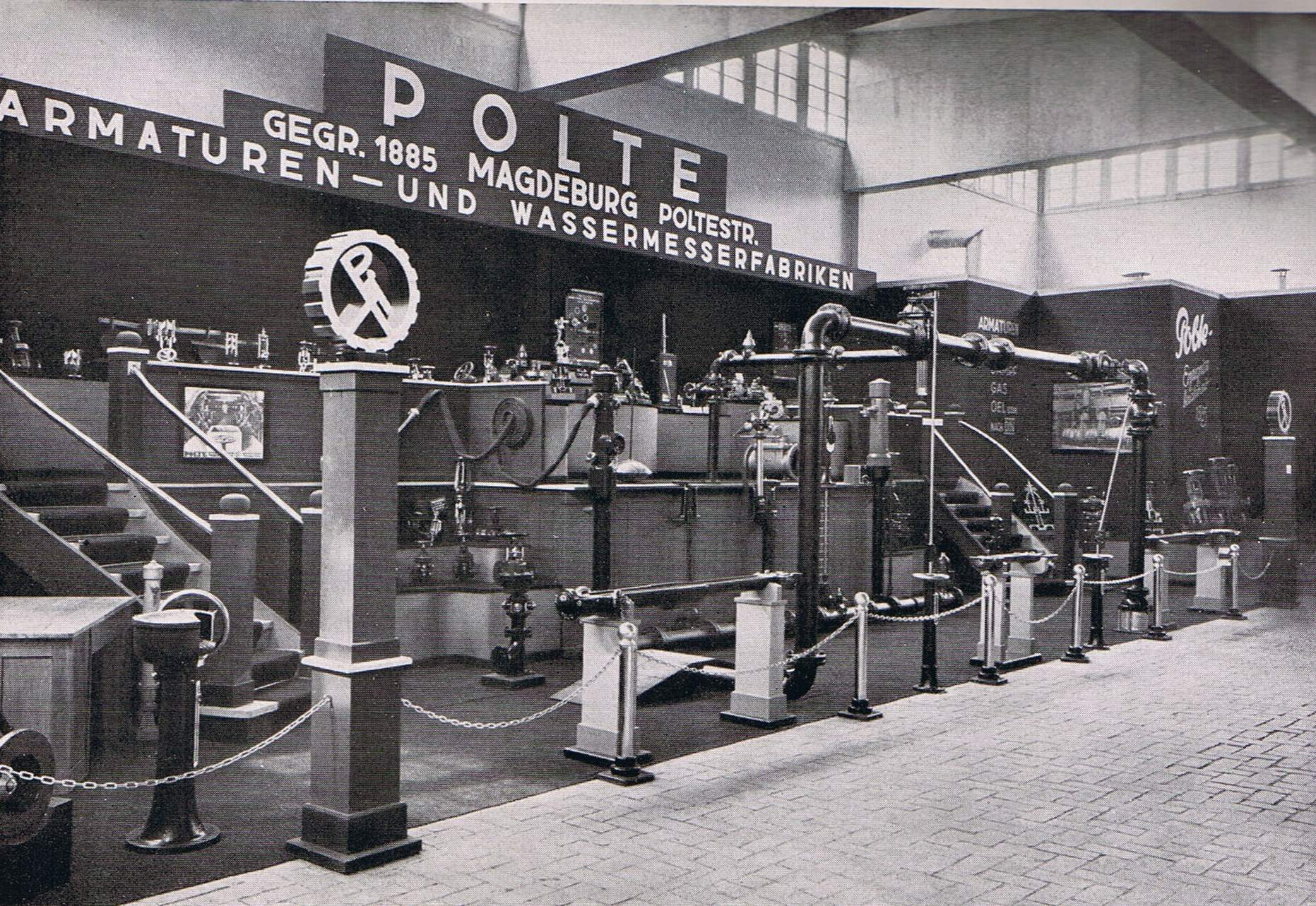 Polte-Werke, Messestand, ca 1934